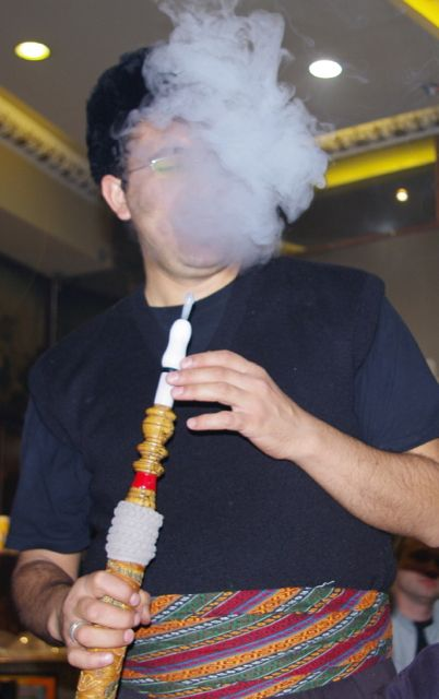 Wasserpfeifenrauchen